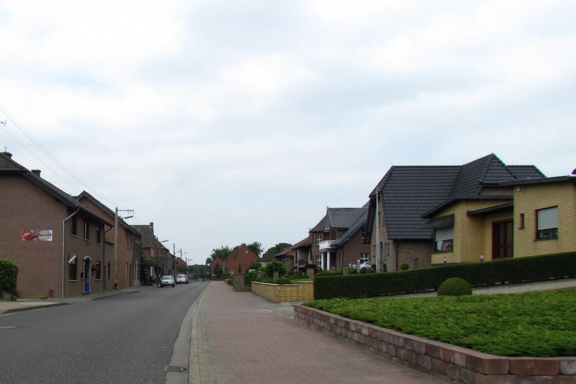 Stein Ortsansicht